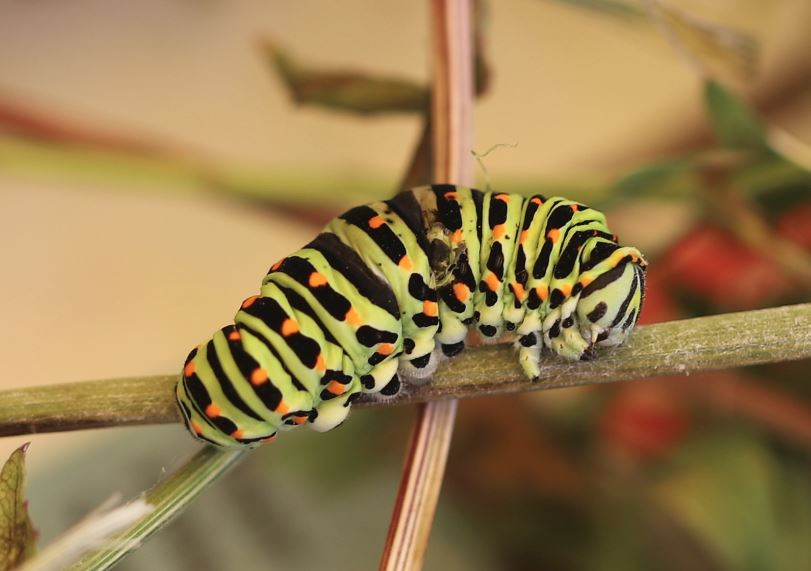 Tote Schwalbenschwanz-Raupe nach Verlassen der Fliegenlarven am 4. August 2020